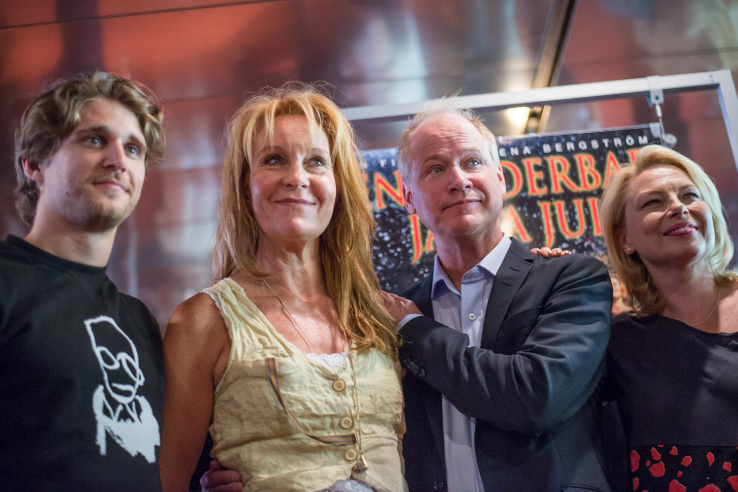 Anastasios Soulis, Maria Lundqvist, Robert Gustafsson och Helena Bergström under presentationen av "En underbar jävla jul" i Filmhuset i Stockholm den 17 augusti 2015.